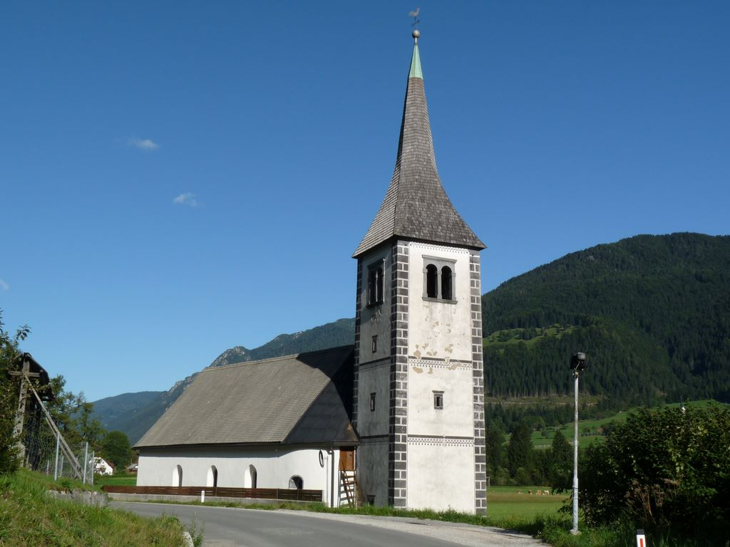 Sv. Klemen v Mojstrani